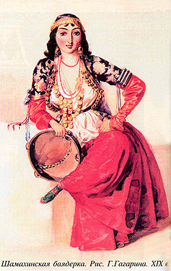 шемаханские баядерки